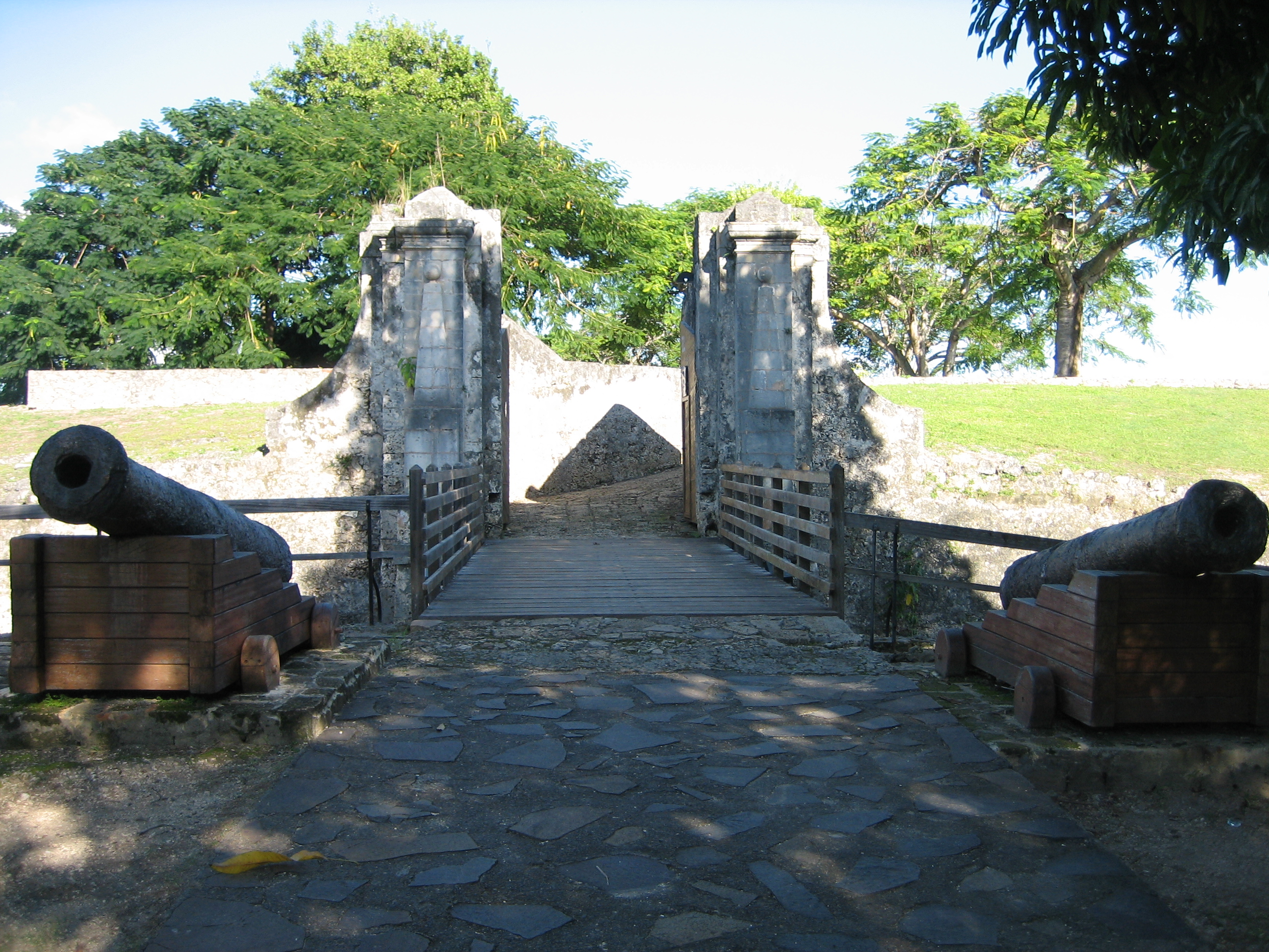 fort fleur d'épée en guadeloupe